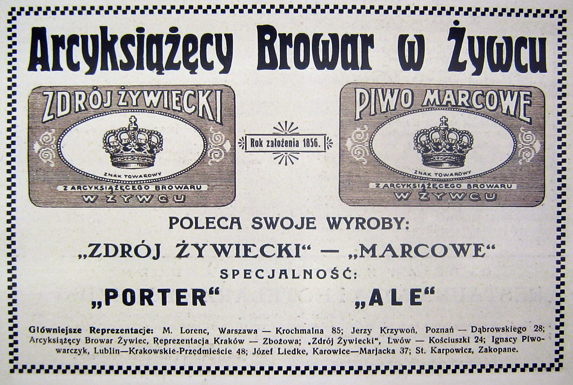 Reprodukcja reklamy prasowej piwa z Browaru w Żywcu. Eksponat Muzeum Browaru Żywiec.